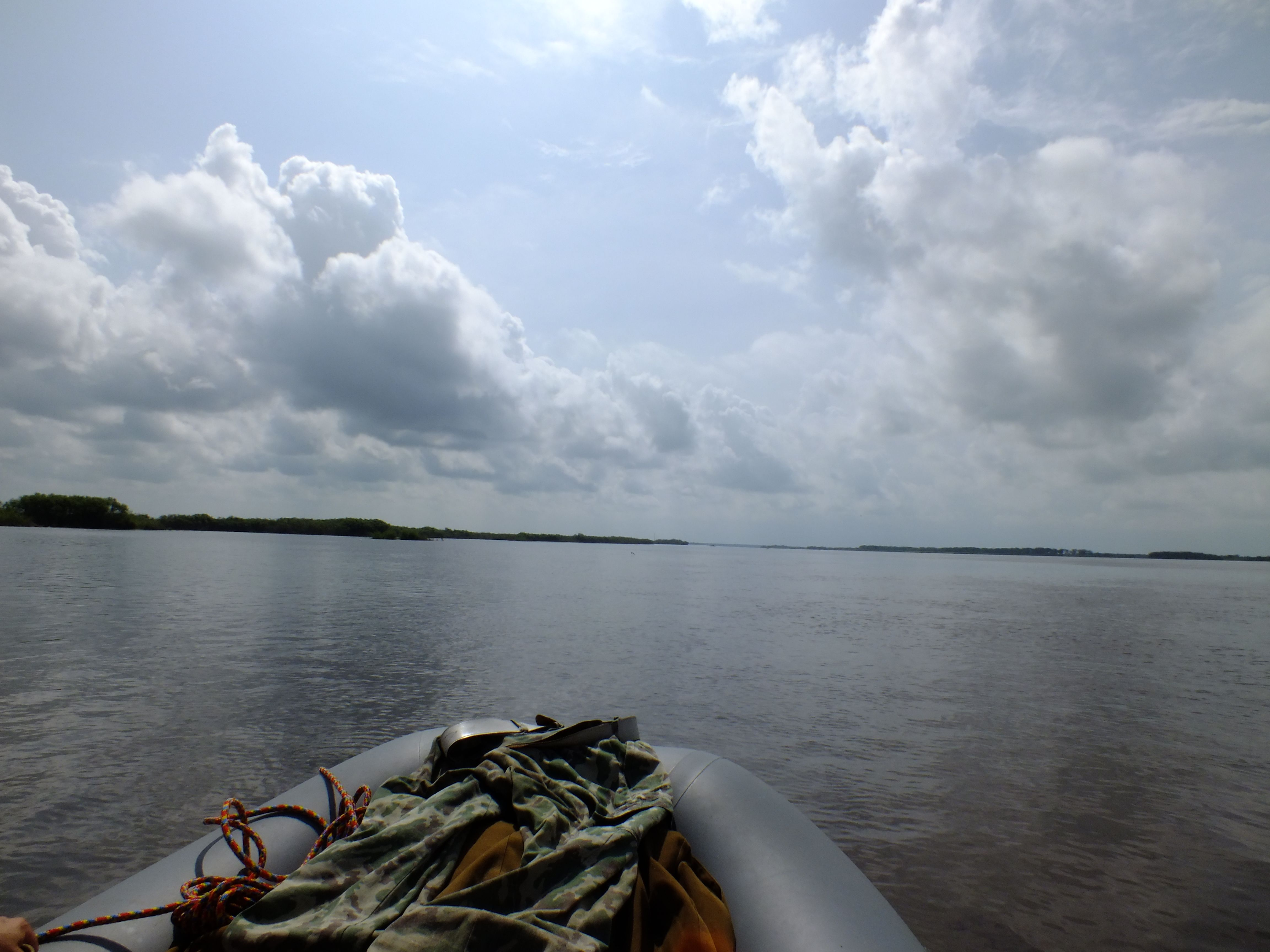 Найхинская протока и устье реки Анюй Хабаровский край